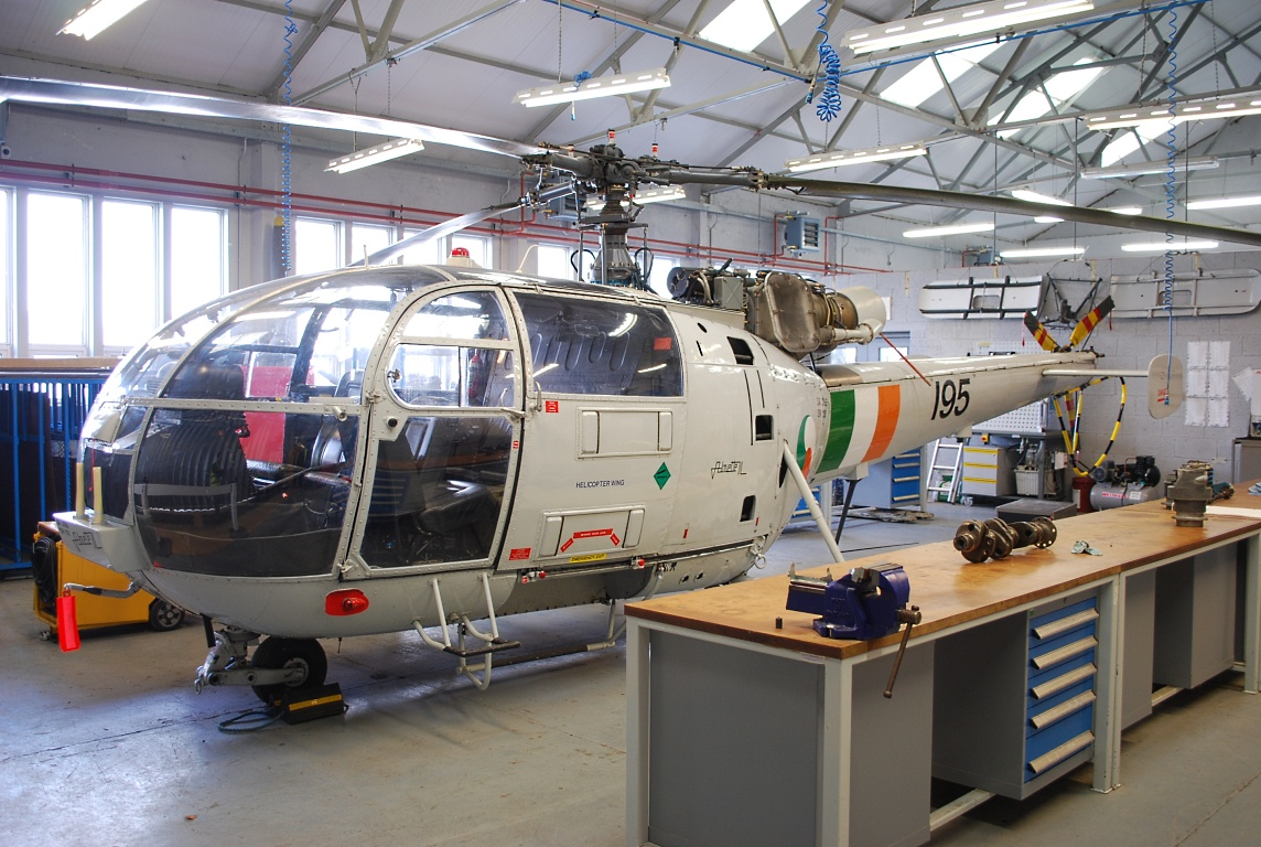 195, Baldonnel 2011